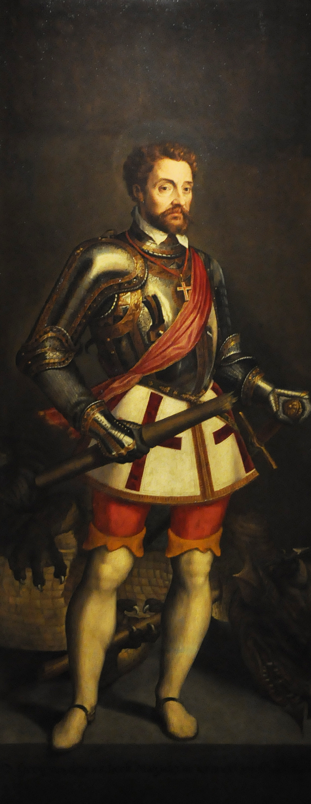 (deel van een triptiek)